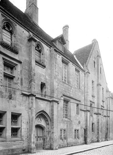 Ancien collège du Mont, détruit en 1944